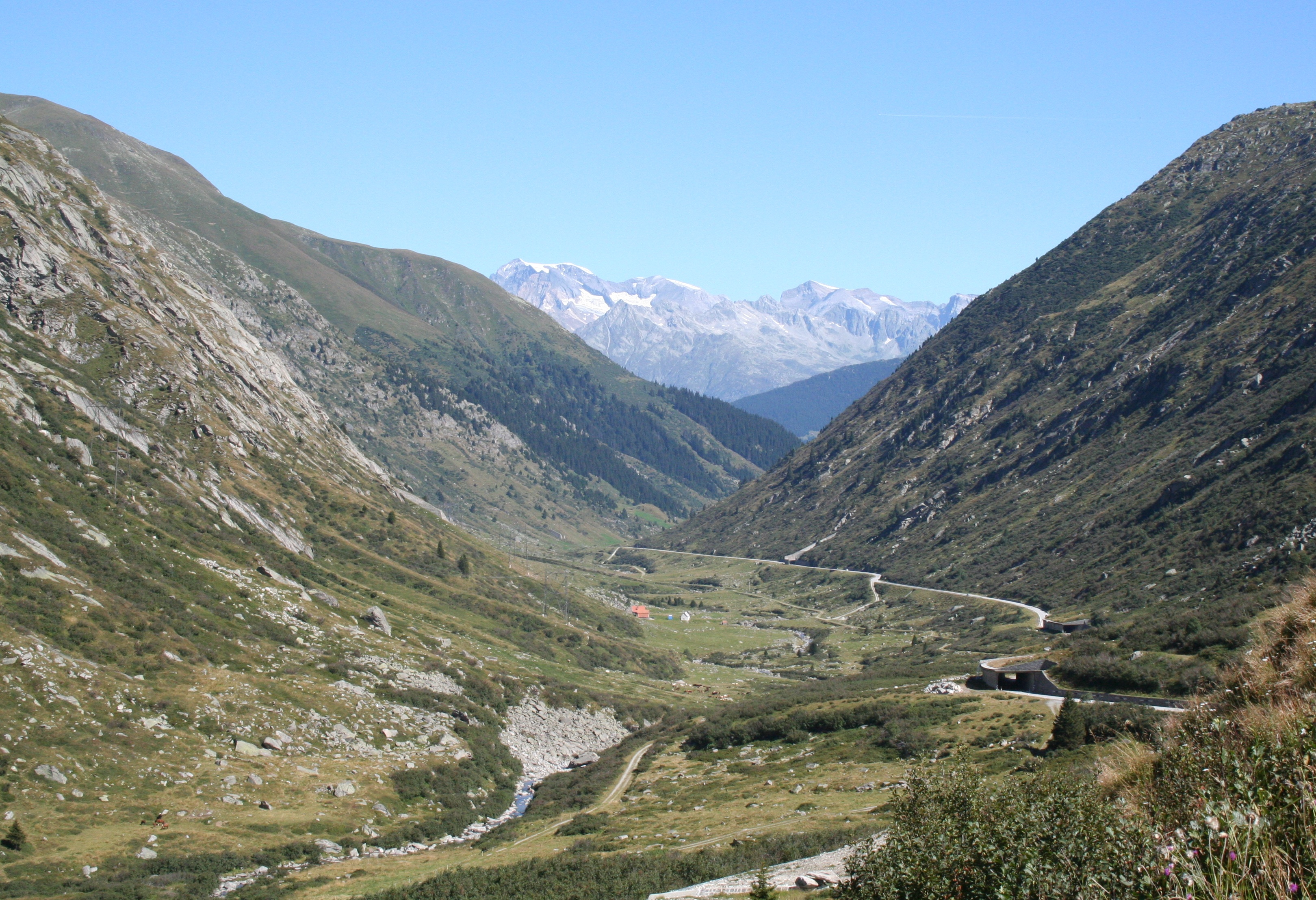 Val Medel nach Norden, südlicher Abschnitt